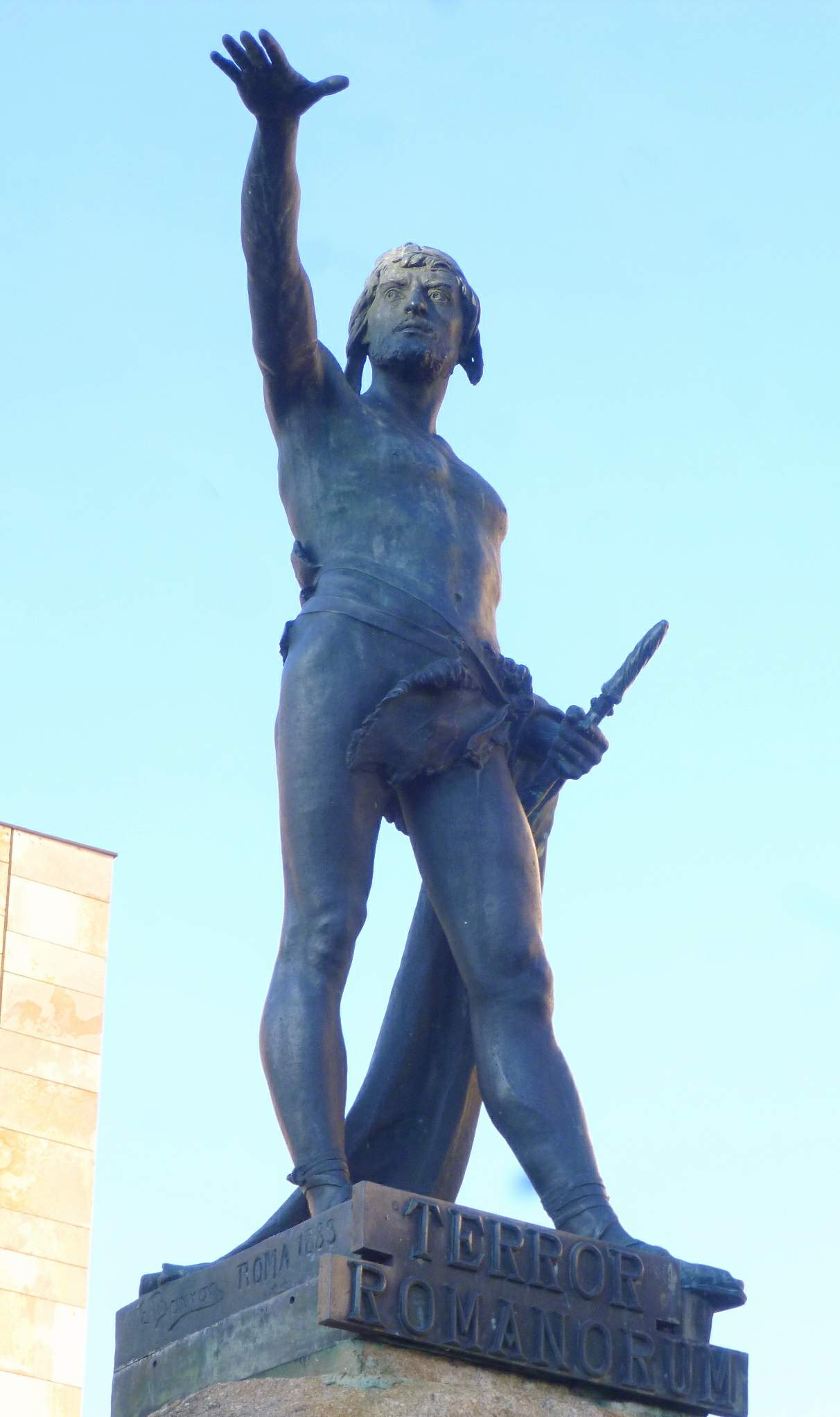 Zamora - Plaza de Viriato, Monumento a Viriato